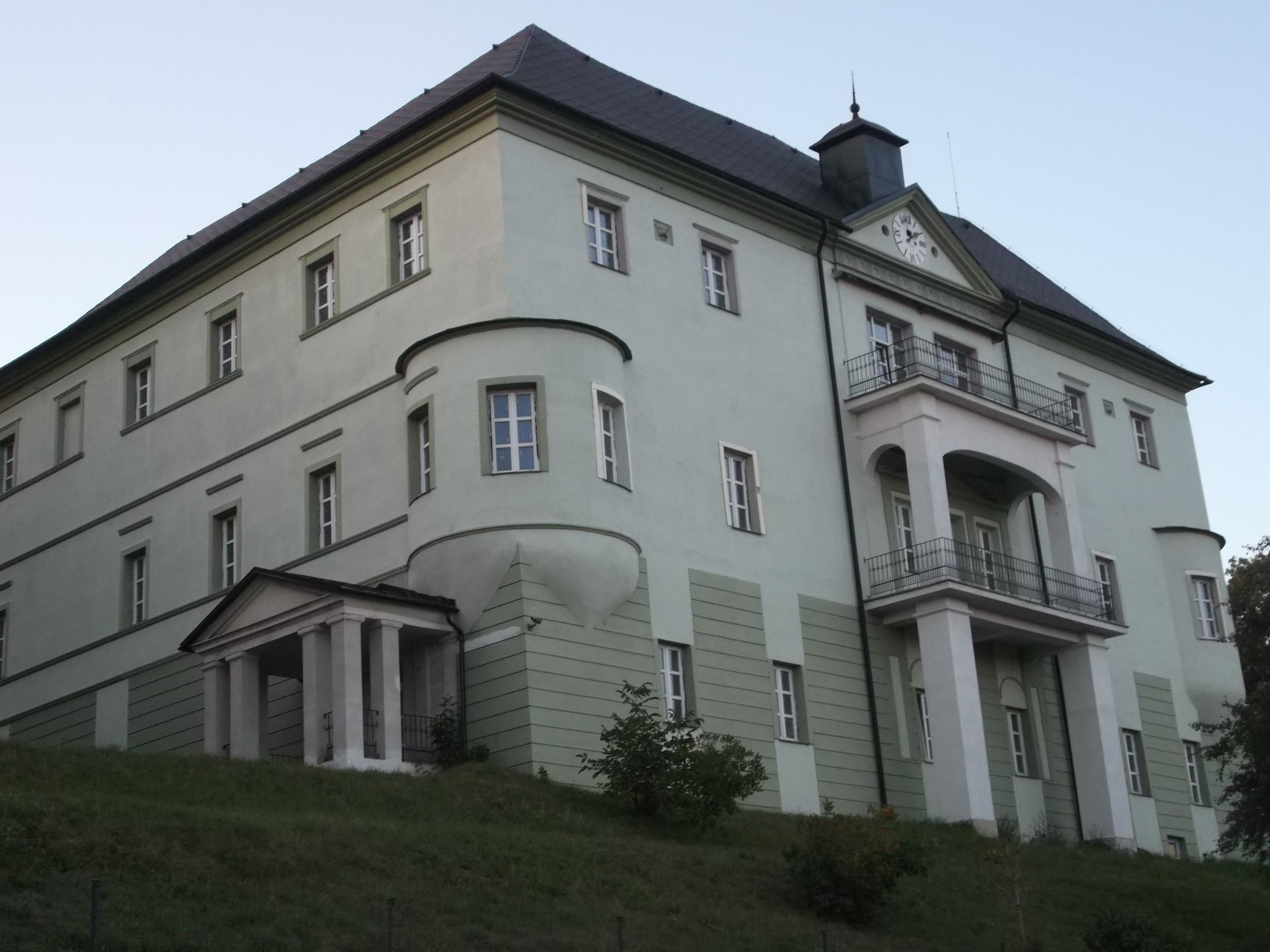 Kaštieľ